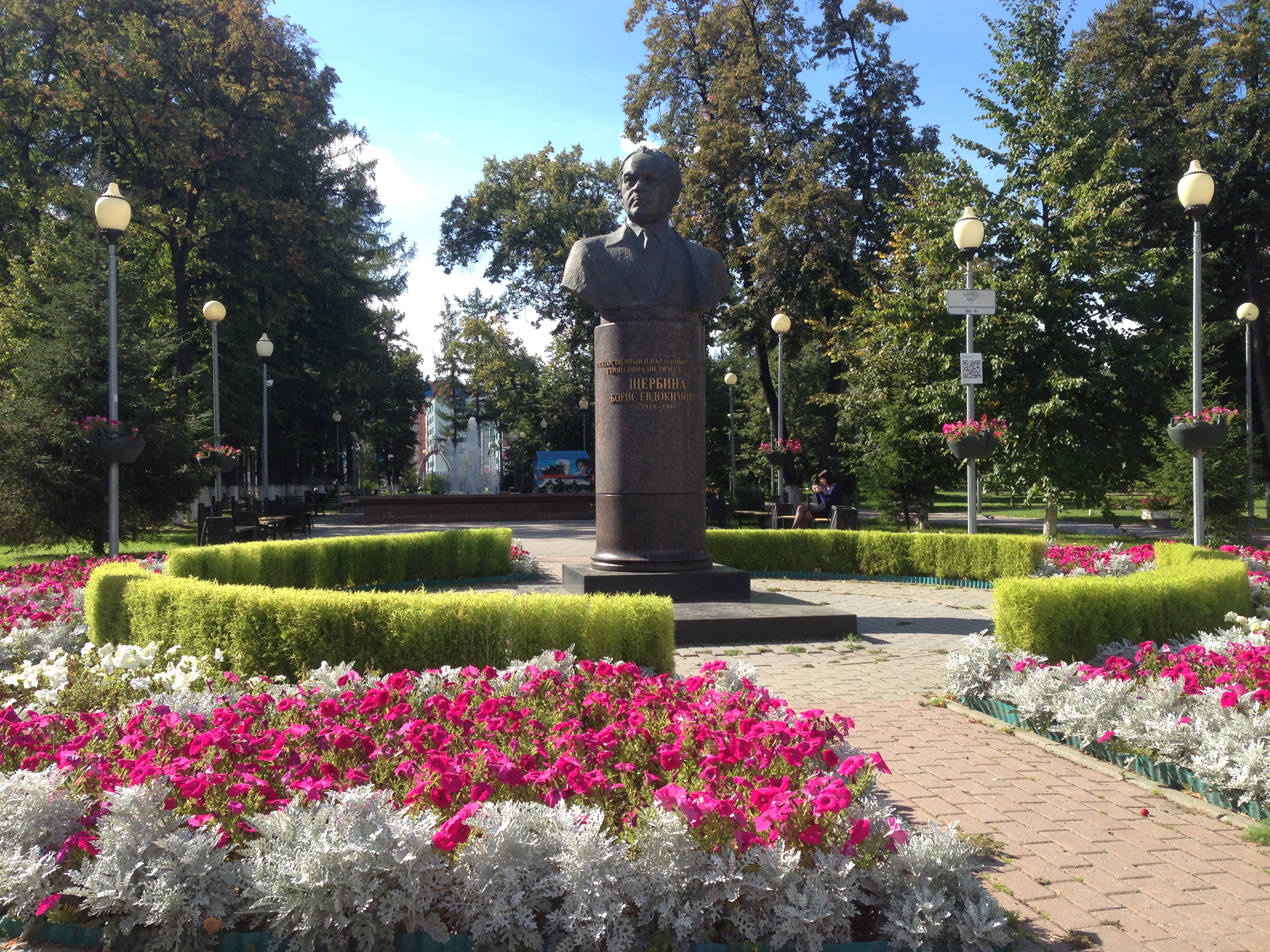 Busto de Boris Ŝĉerbina en Nemcov parko. Tjumeno, Rusio.